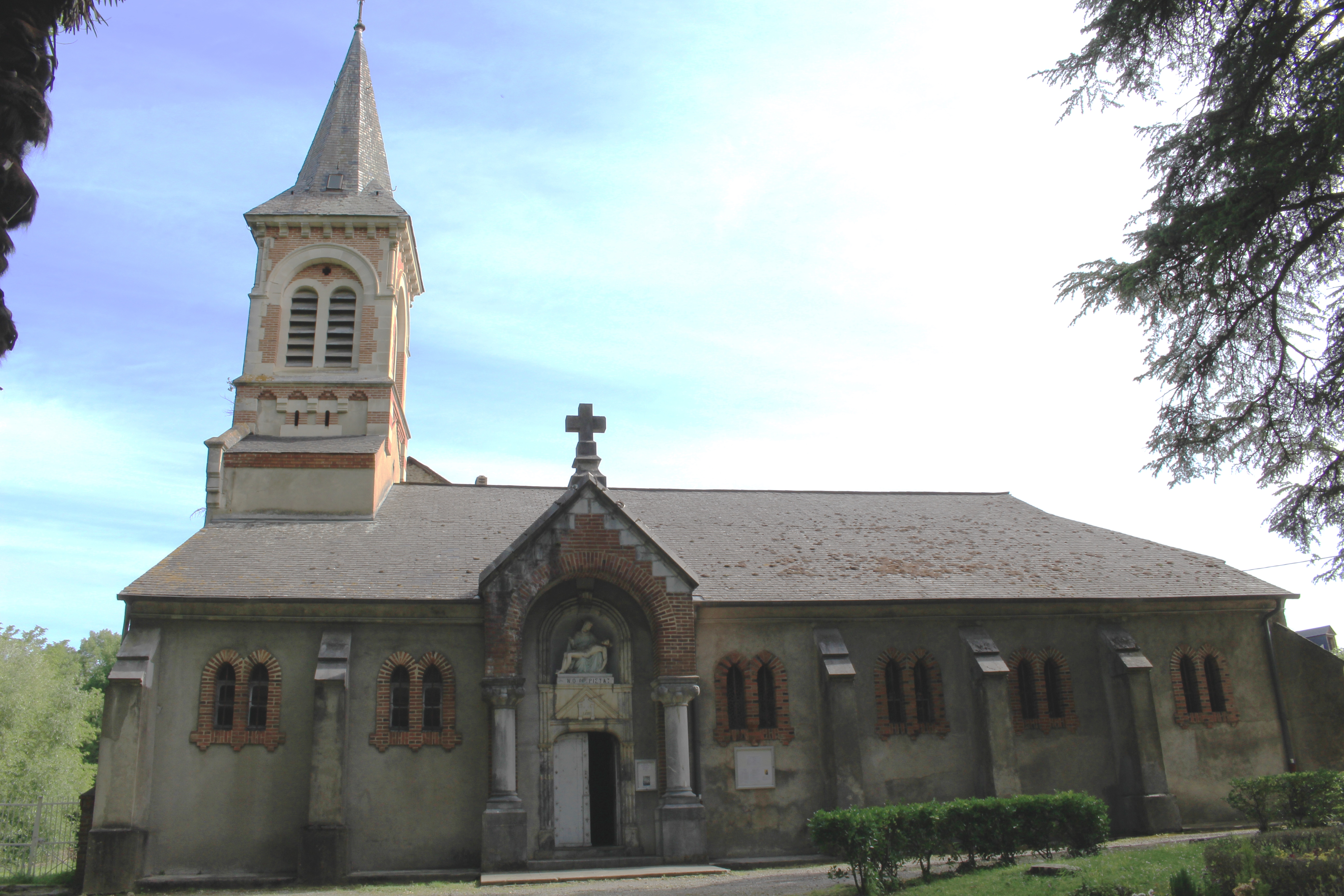 Chapelle Notre-Dame de Piétat de Barbazan-Debat (Hautes-Pyrénées)